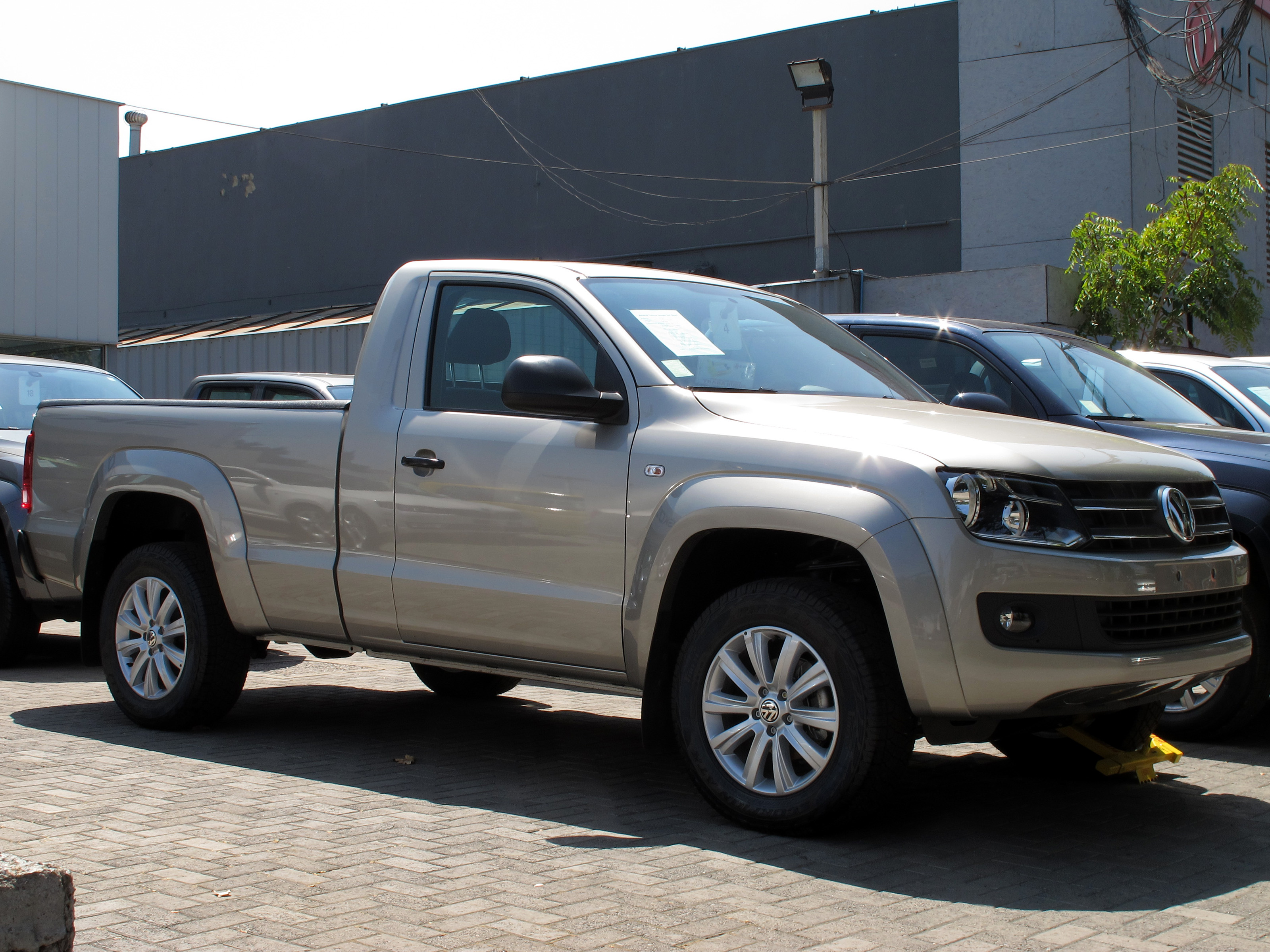 Volkswagen Amarok 2.0 TDi Sport 4Motion 2015